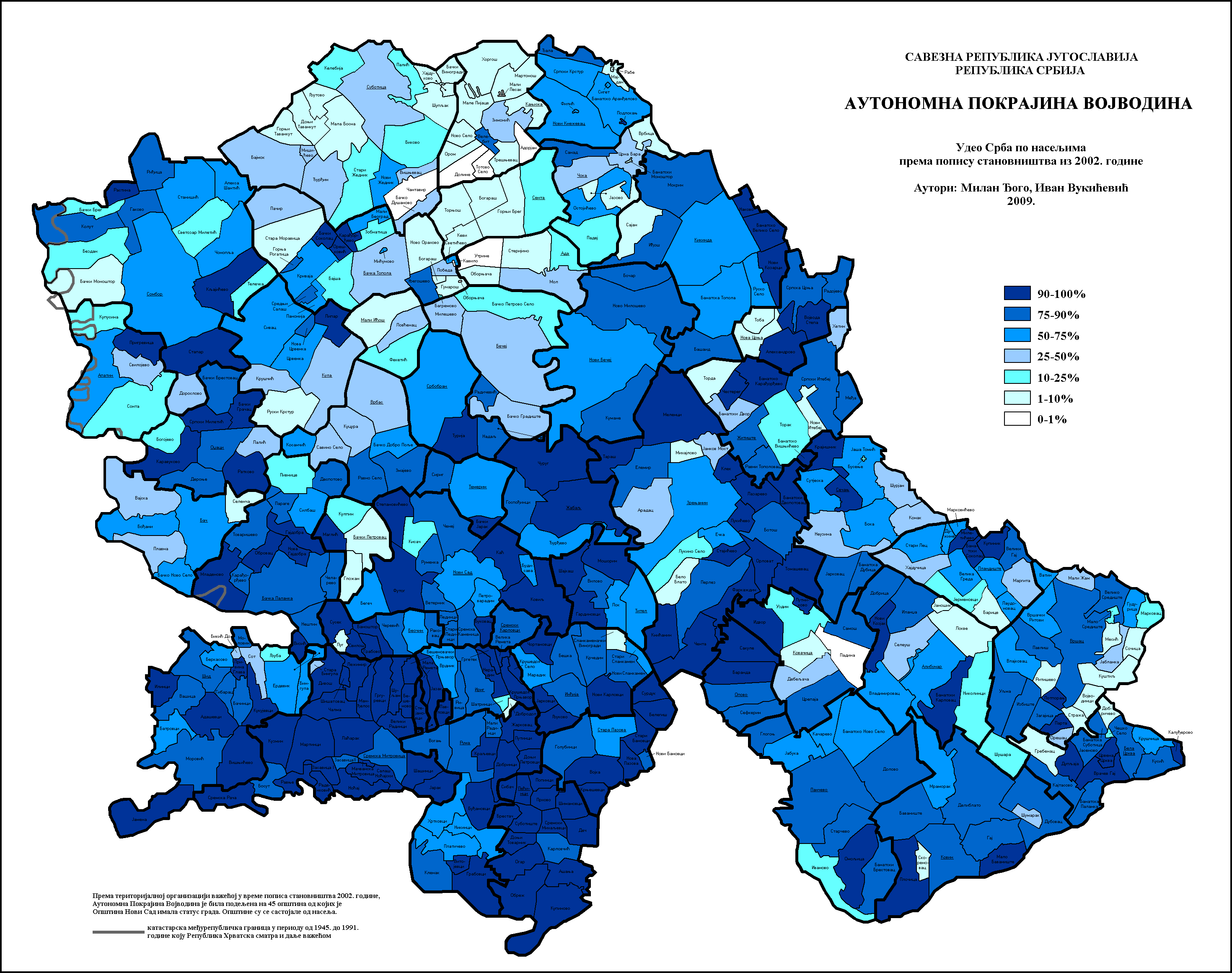 Удео Срба у Војводини по насељима 2002. године. Аутори: Милан Ђого - , Иван Вукићевић